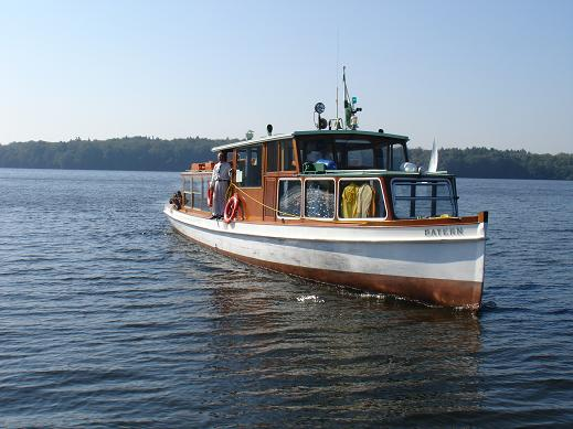 Szczecinecki Tramwaj Wodny "Bayern" 6